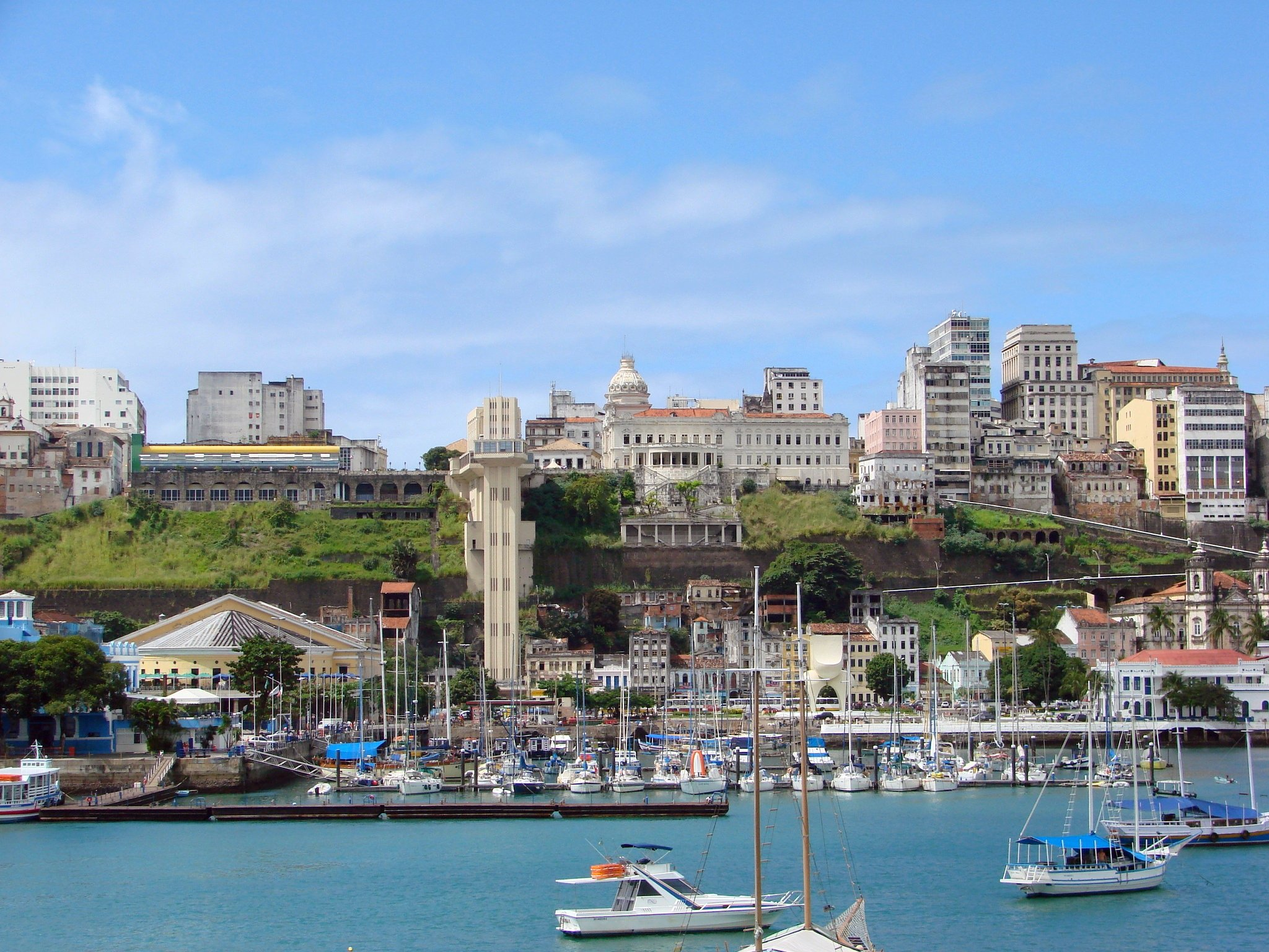 Centro Histórico de Salvador - Vista do mar, no Forte São Marcelo. Pode ser vista a cidade baixa, Mercado Modelo, Elevador Lacerda e Palácio Rio Branco.